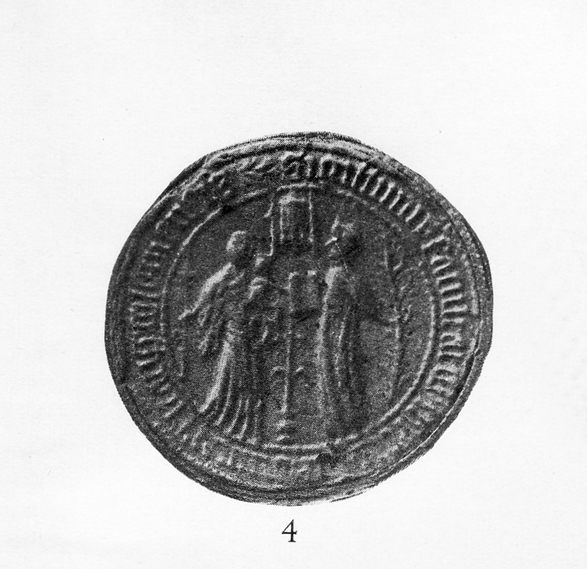 Siegel der Theologischen Fakultät Köln von 1393. Das Siegel in runder Foerm hat im Original einen Durchmesser von 42 mm. Seine Umschrift lautet: „Sigillum facultatis heologiae universitatis coloniensis“.